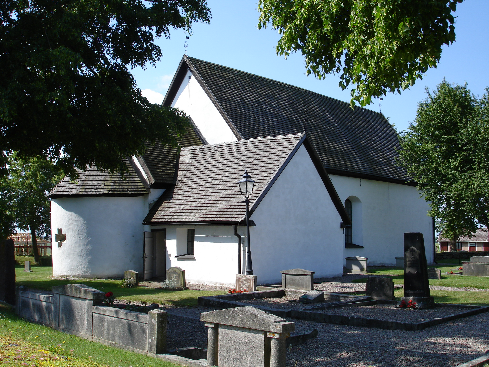 Kumla kyrka i Östergötland sommaren 2009